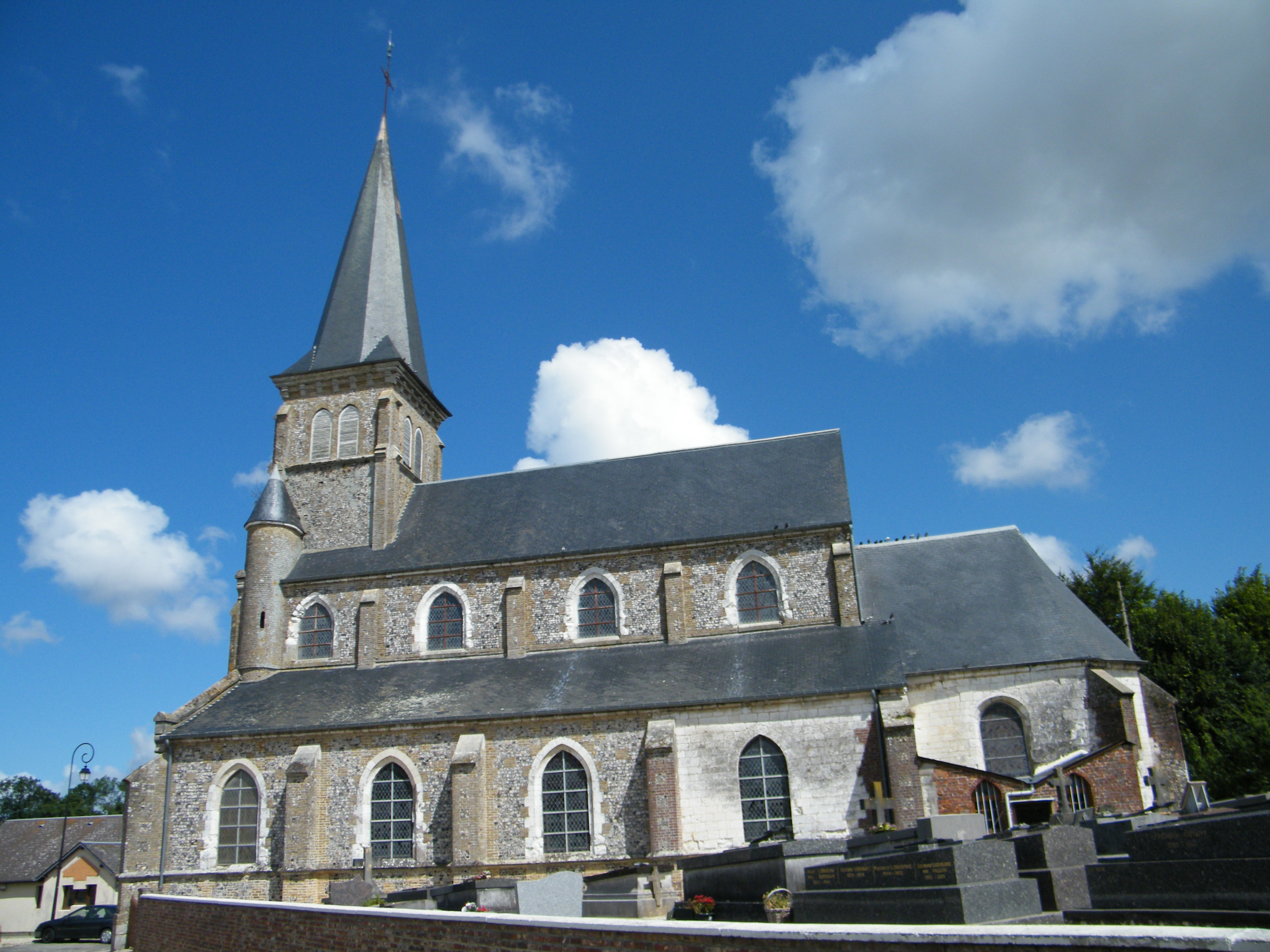 Auquemesnil, Seine-Maritime, France, église (2)